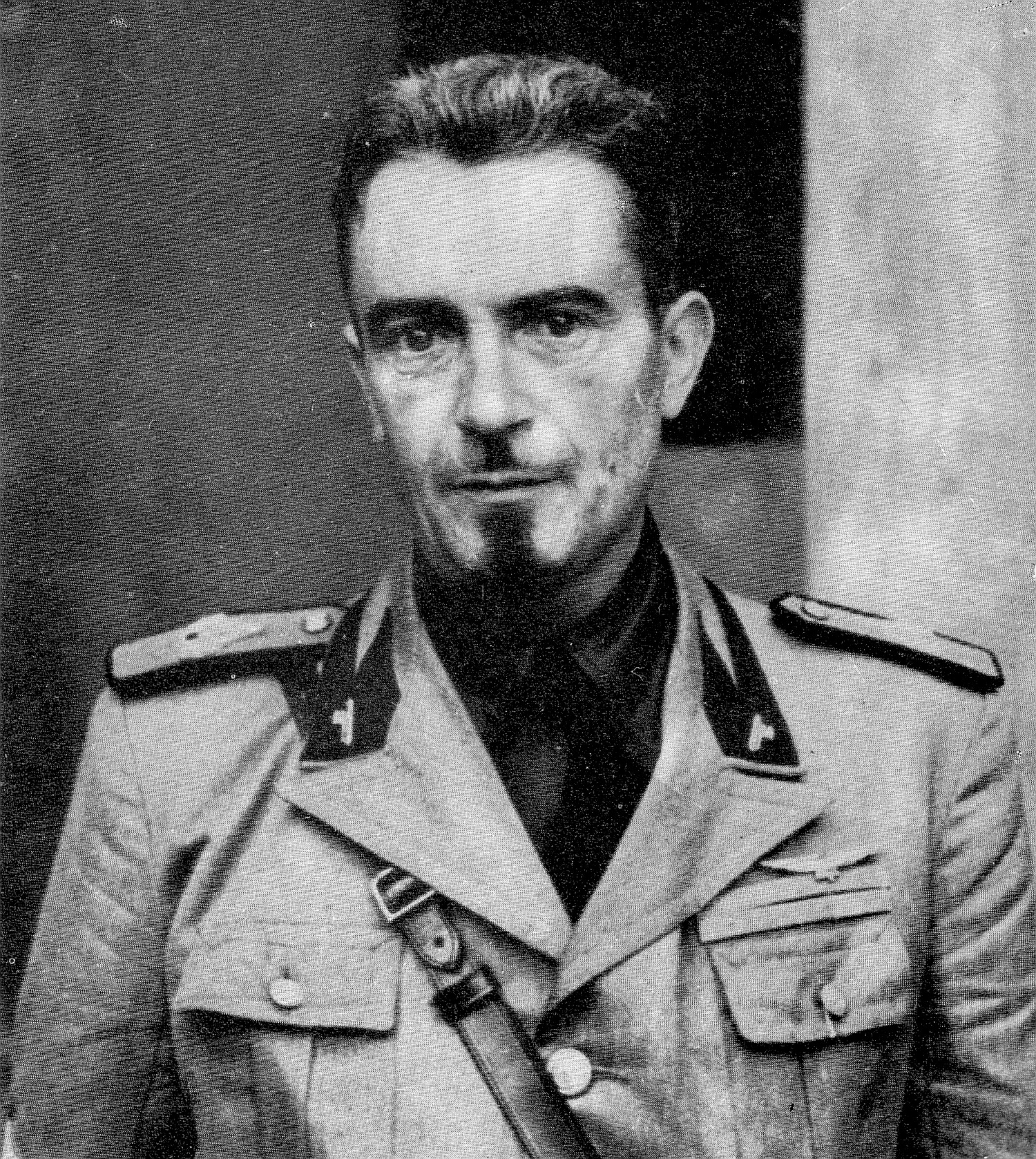 Igino Ghisellini, federale fascista repubblicano di Ferrara, ucciso tra il 13 e il 14 novembre 1943 dai GAP